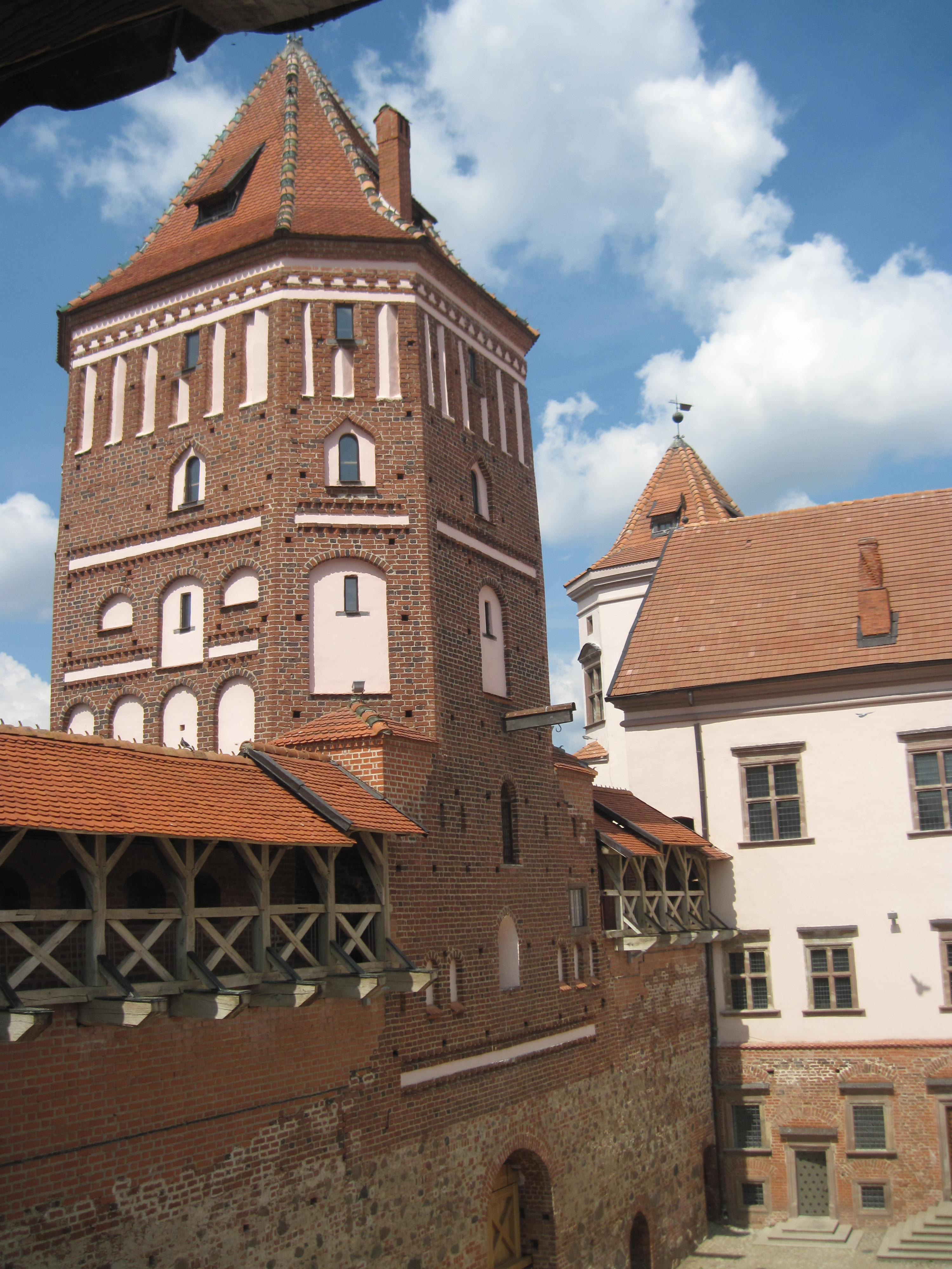 Мірскі замак. Від на ўзную вежу з паўднёвай галерэі